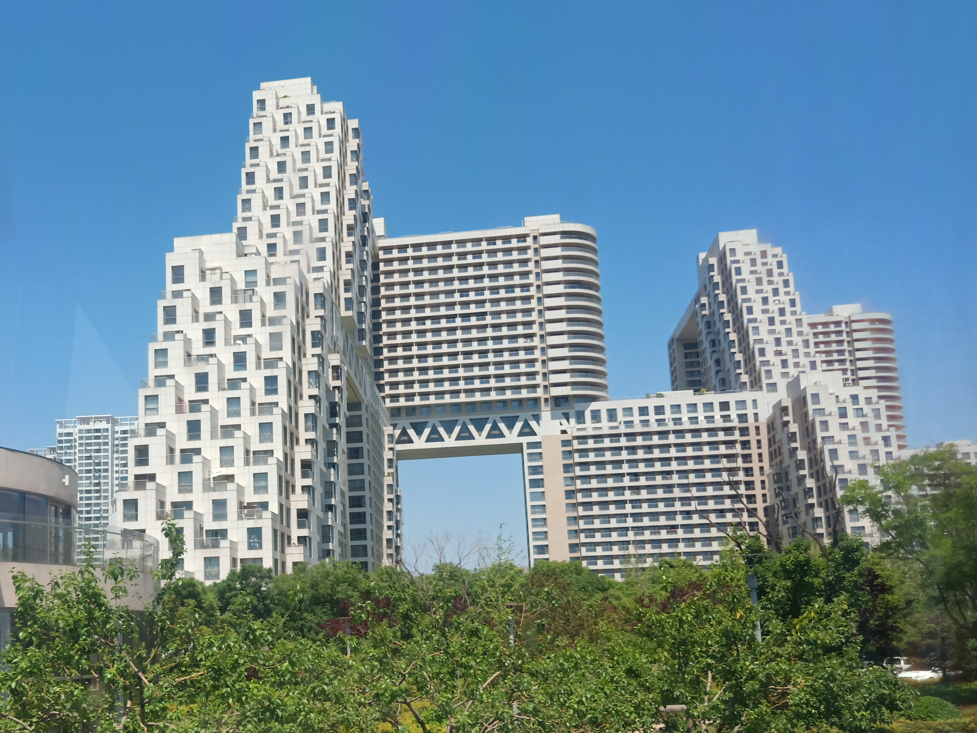 粵語: 河北秦皇島樓盤——海碧台